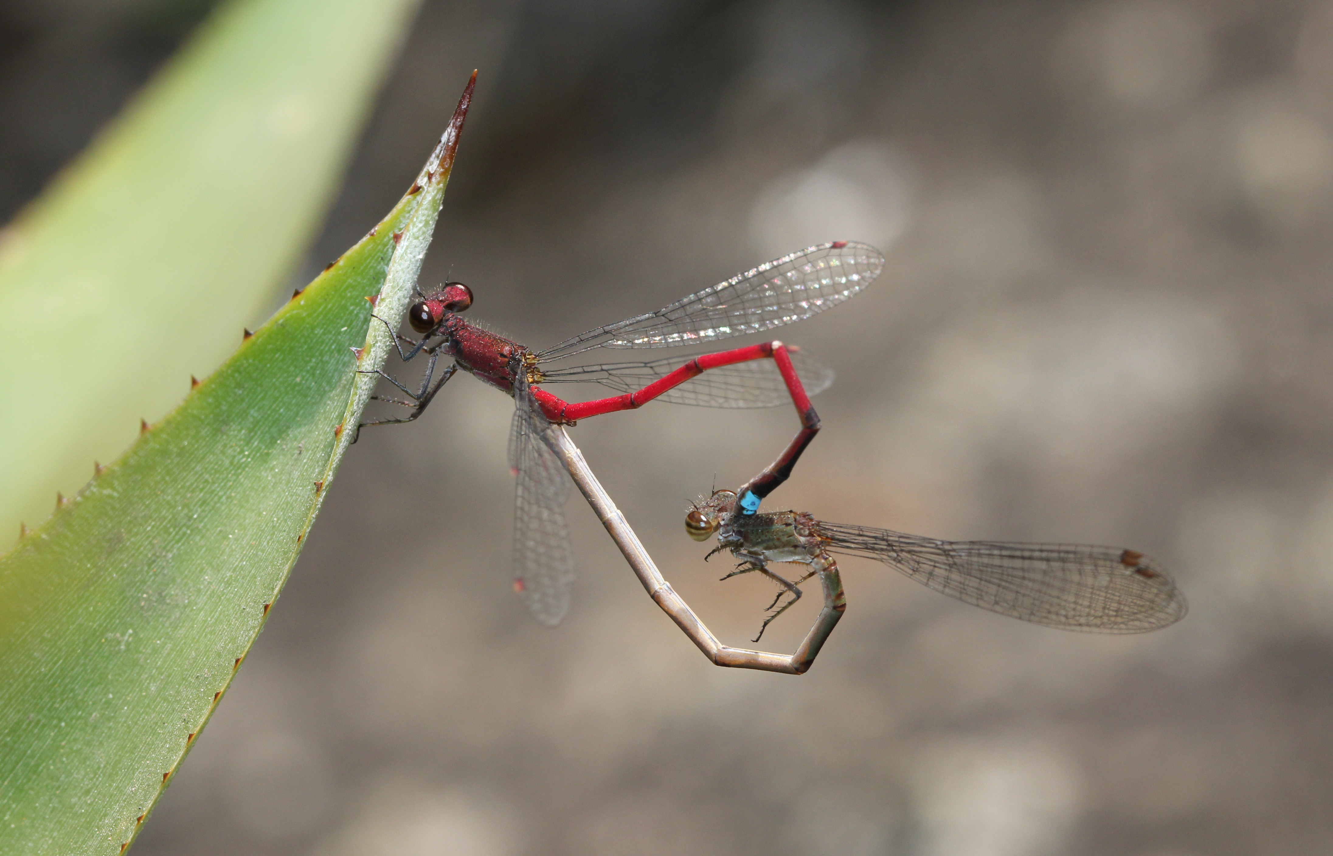 Libélulas copulando